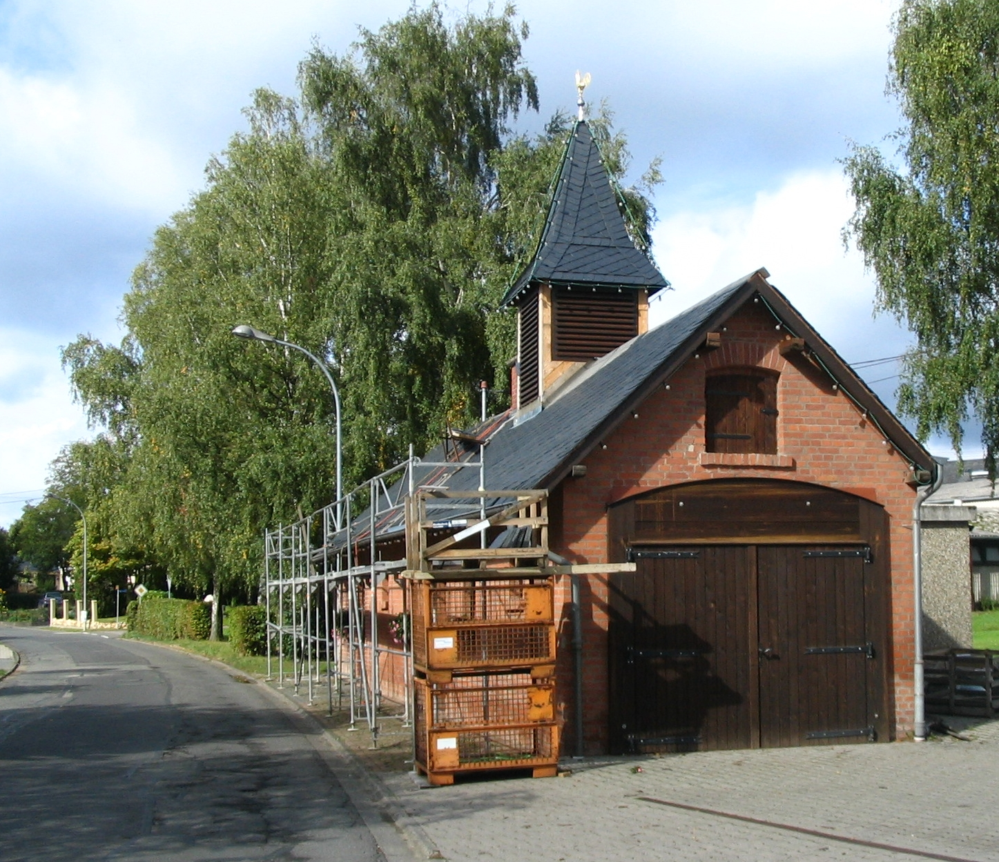 historisches Backhaus in Klosterkumbd (Hunsrück)